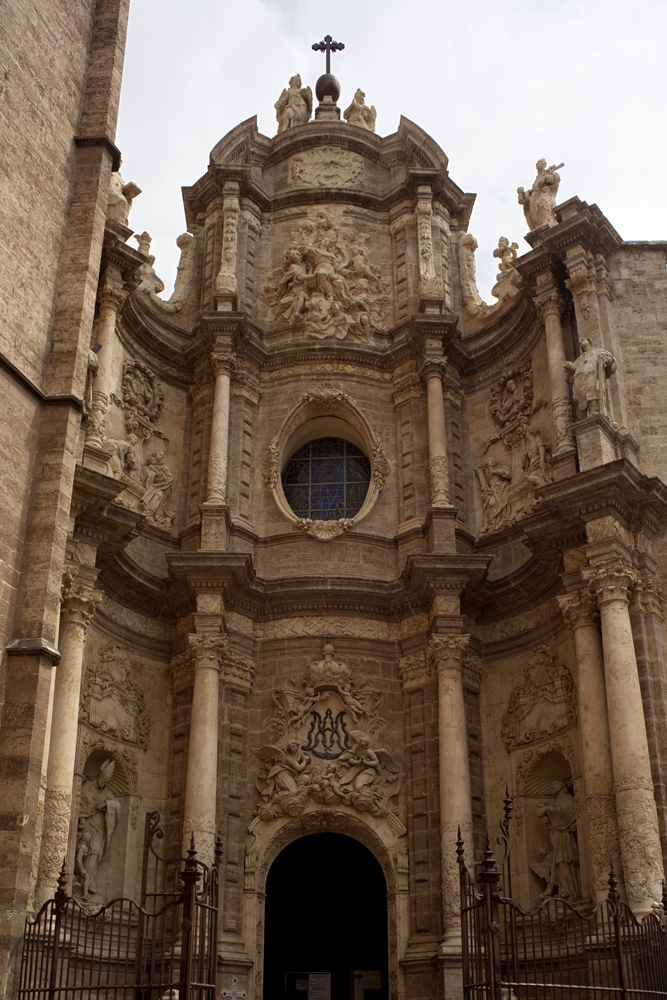 Cultural Heritage Spain